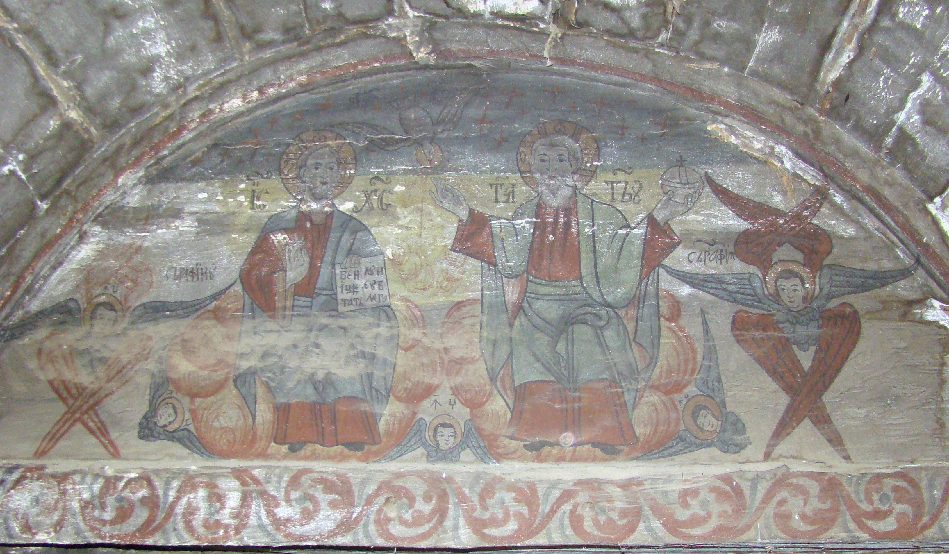 Sfânta Treime. Biserica de lemn „Sfinții Arhangheli Mihail și Gavriil" din Derșida, județul Sălaj